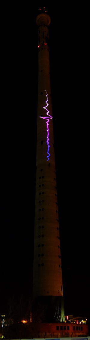 Активисты устроили лазерные проекции с различными надписями, чтобы защитить телебашню